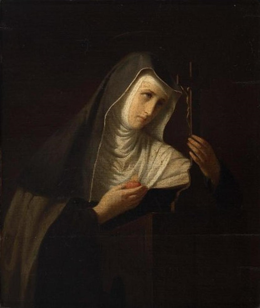 Bł. Salomea (olej, 1837)